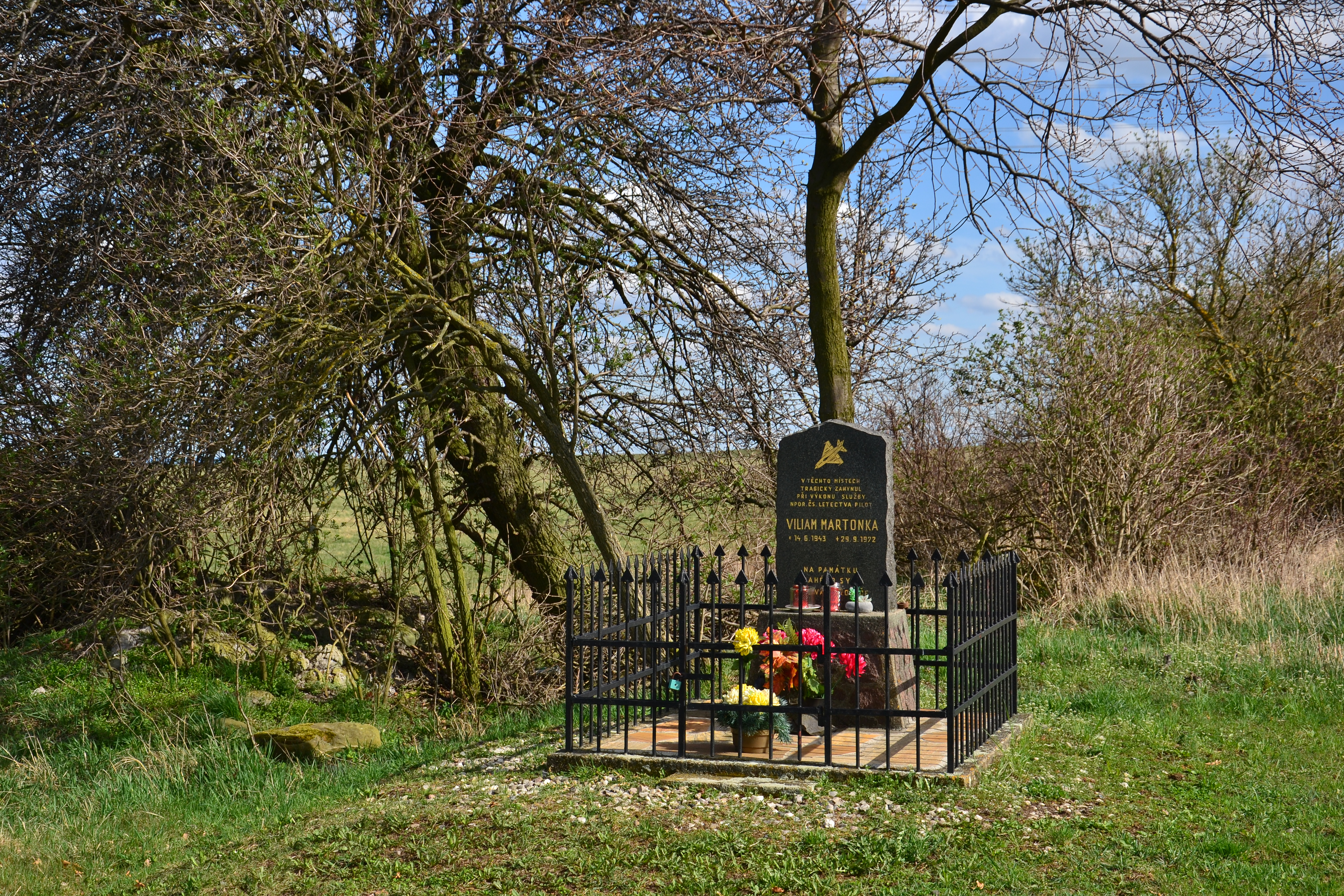 Nová Víska u Rokle – pomník pilota letecké nehody